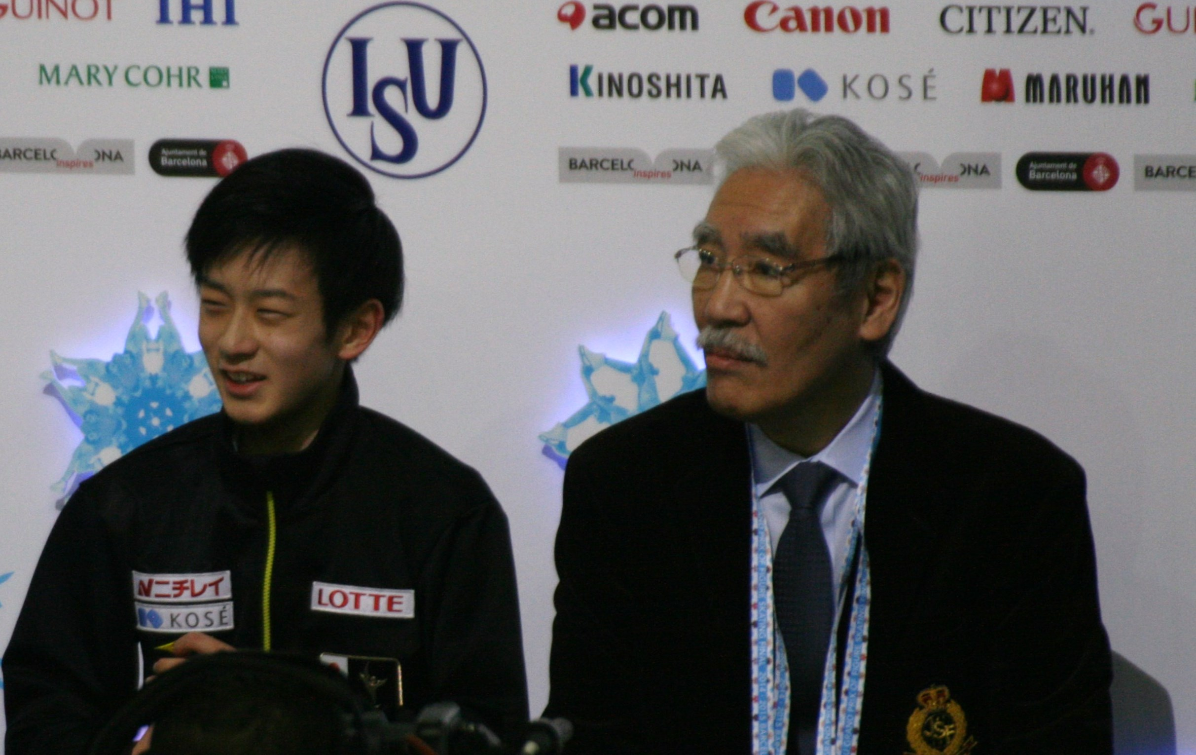 Сота Ямамото (Япония) и его тренер Хироси Нагакубо на финале Гран-при среди юниоров 2014-2015.